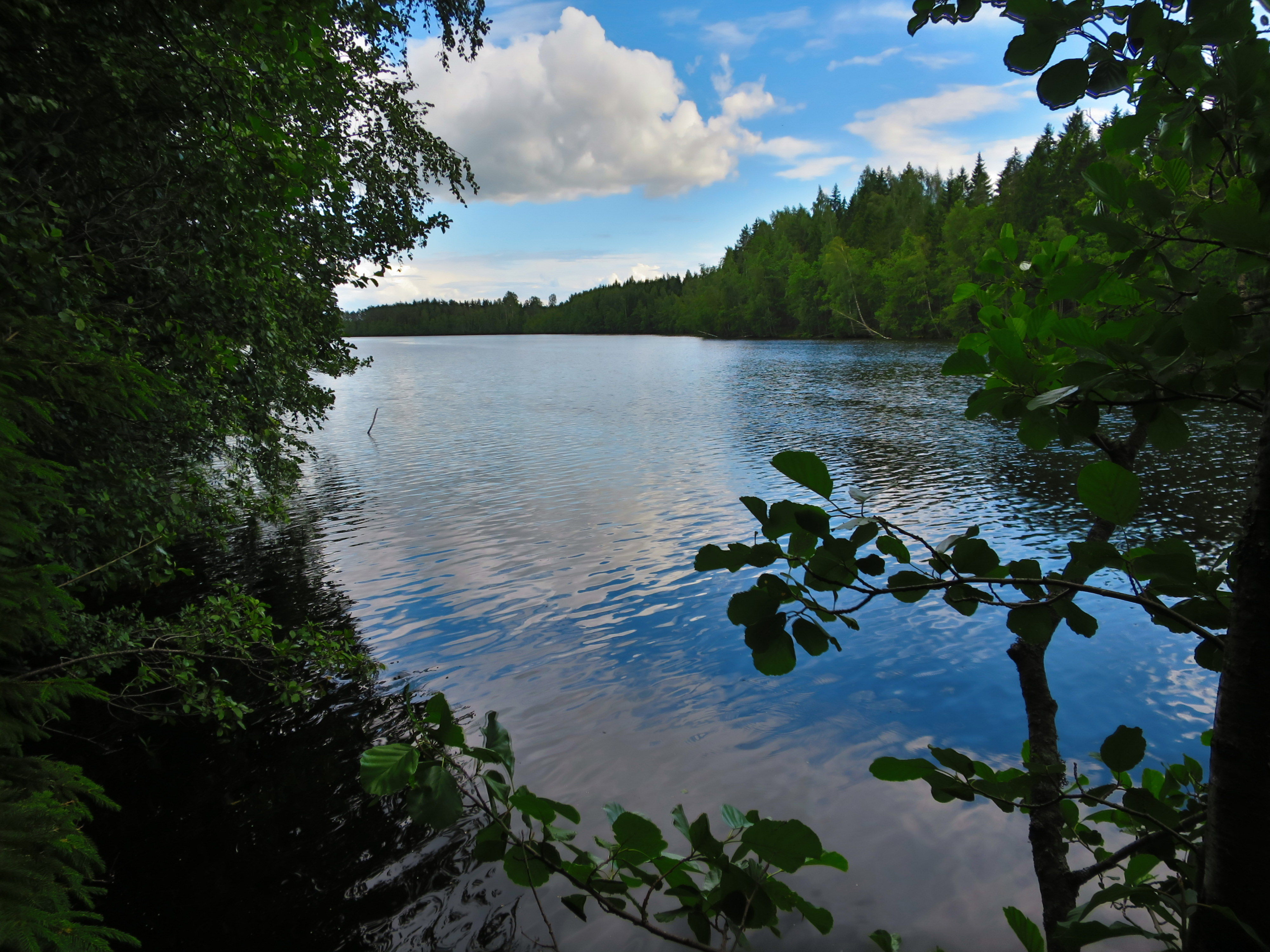 Piigandi Mustjärv